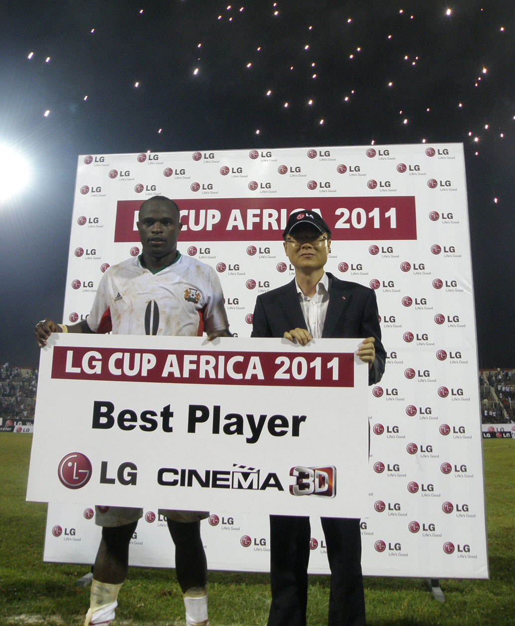 LG전자가 동아프리카에서 케냐와 수단간 국가대표 축구 친선경기 개최하고 고아원생들을 초청하는 등 사회공헌활동을 펼쳤다. LG전자가 25일(현지시각) 케냐 나이로비에서 개최한 케냐와 수단 축구 국가대표팀간의 'LG 컵 아프리카 2011' 친선 경기 모습 ※ LG전자 뉴스룸 에서 관련 보도자료를 확인실 수 있습니다.